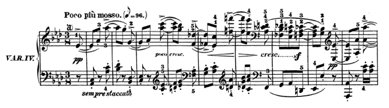 Compassos iniciais do primeiro movimento da Sonata Op. 26 de Beethoven - Variação IV